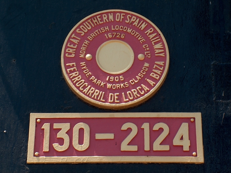 Placa/Logo de la GSSRCL de la locomotora 130-2124, preservada en Águilas (Provincia de Murcia, España).